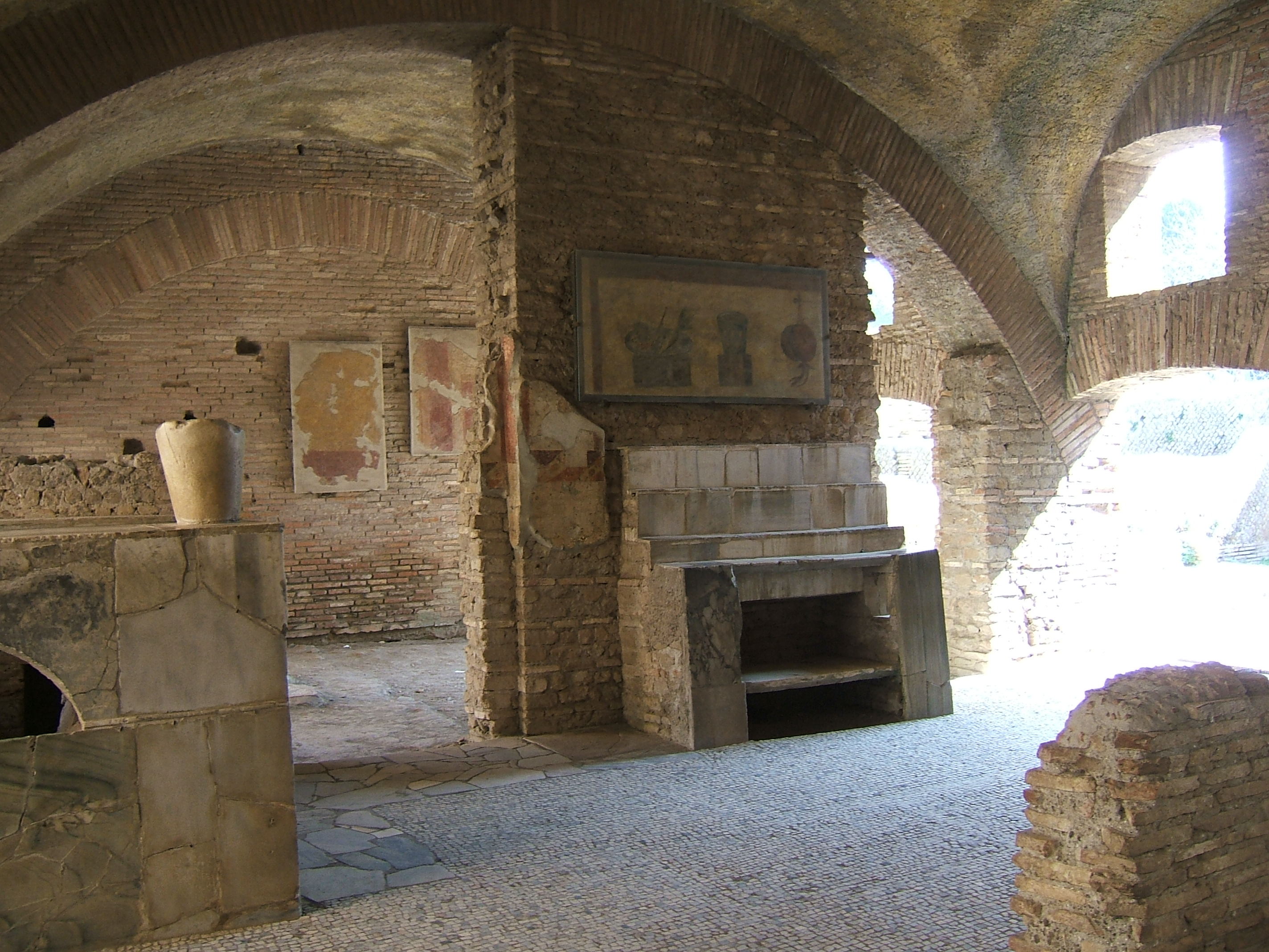 Thermopolium à Ostie Thermopolium ad Ostia Antica, Roma, Italia